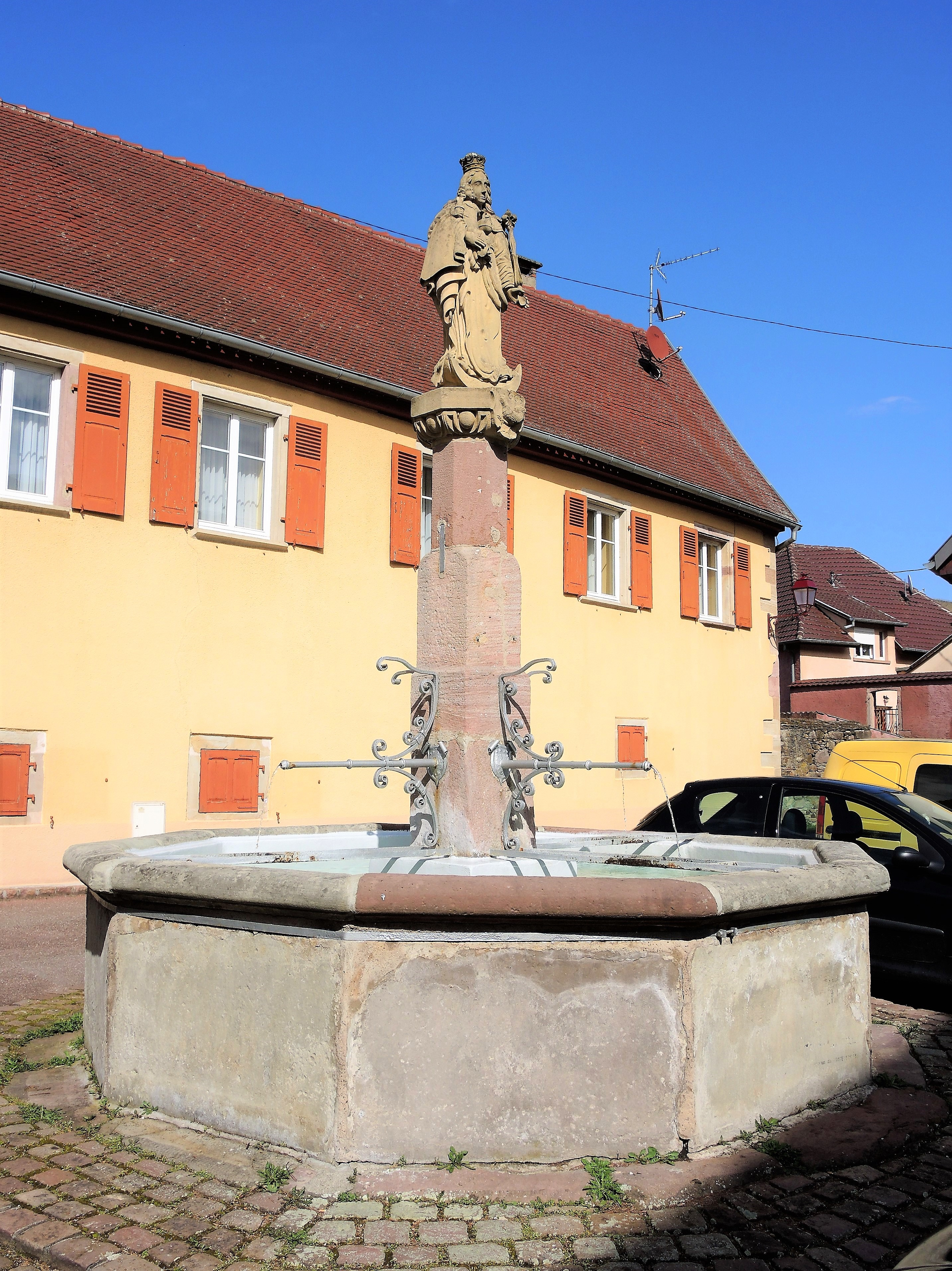 Fontaine de la Vierge. Soultzmatt. Haut-Rhin